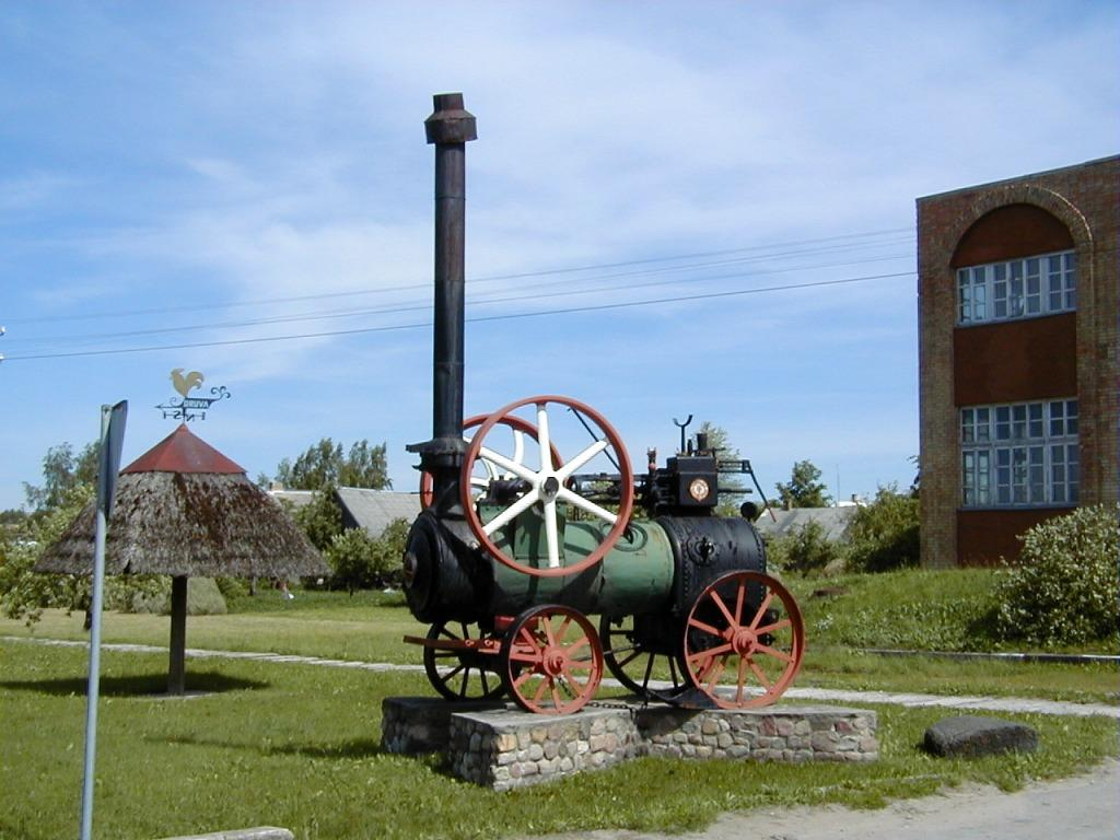 Druva pie Saldus, lokomobile 2000-06-11